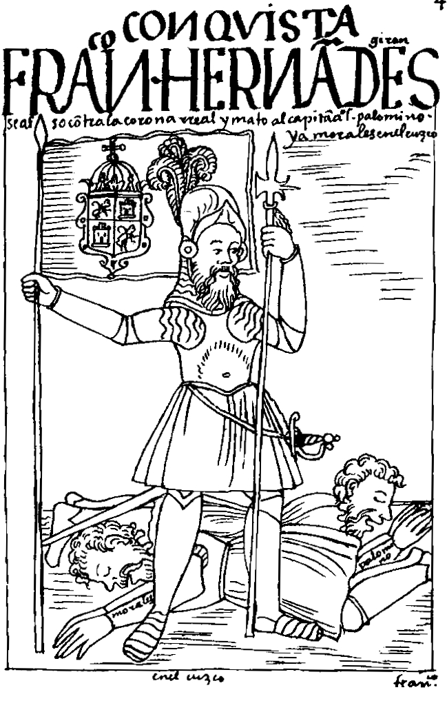 Francisco Hernández Girón, encomendero español que se rebeló en el Perú en 1553 contra la autoridad real. Según dibujo de Guamana Poma de Ayala.